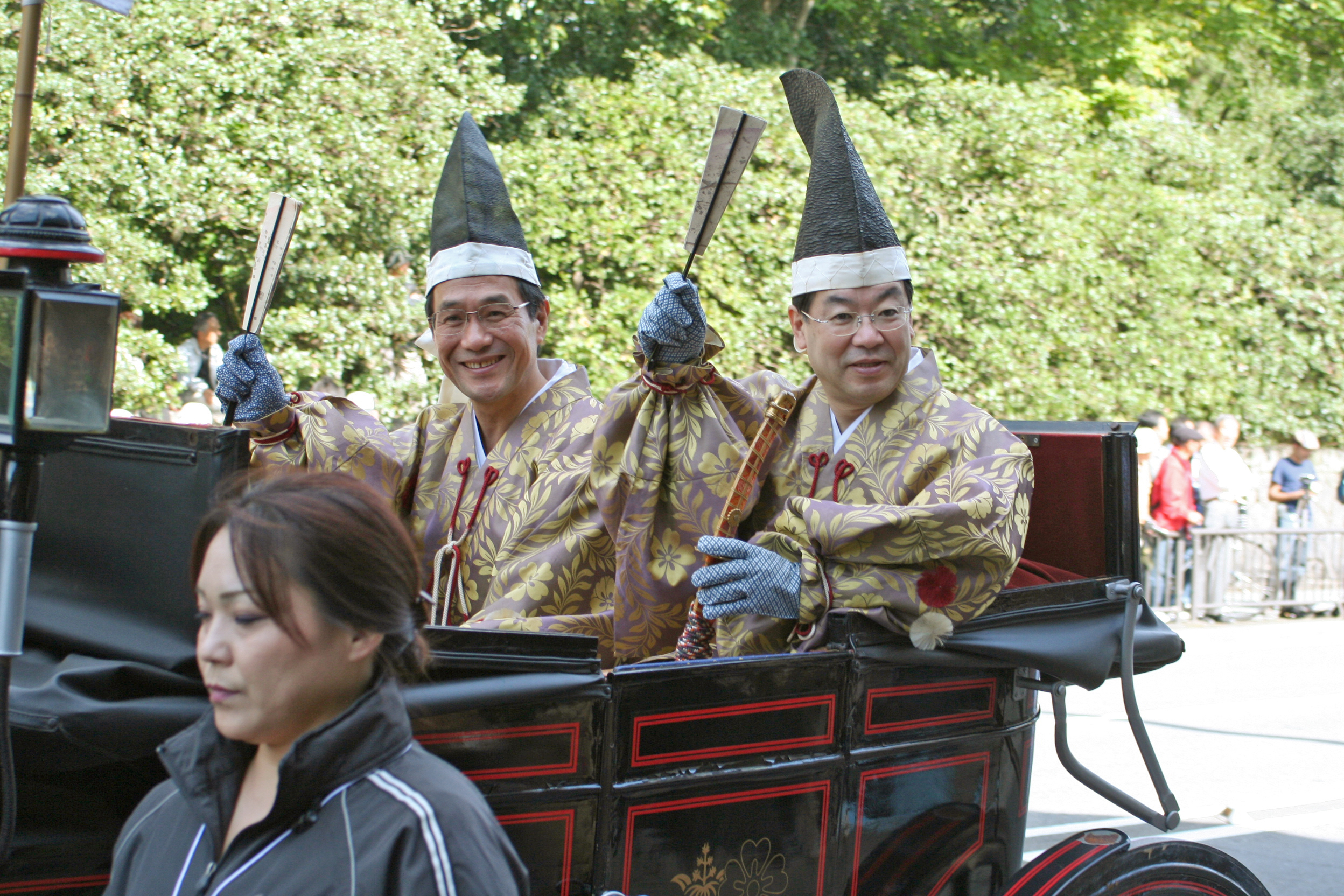 京都府京都市にて開催された時代祭。正午の御所から平安神宮までの行進の様子。2009年10月22日撮影。